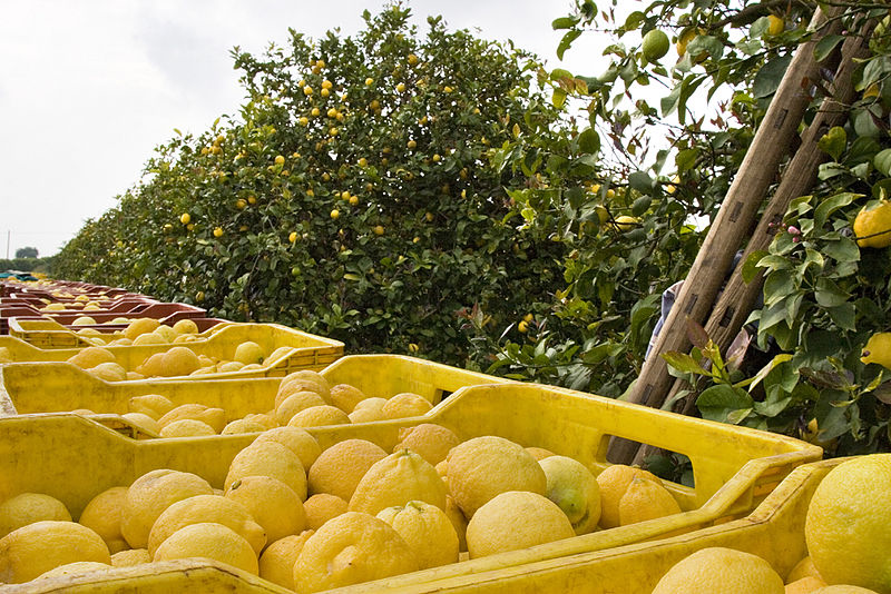 Ceste di limoni